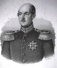 Duke Georg of Sachsen-Altenburg